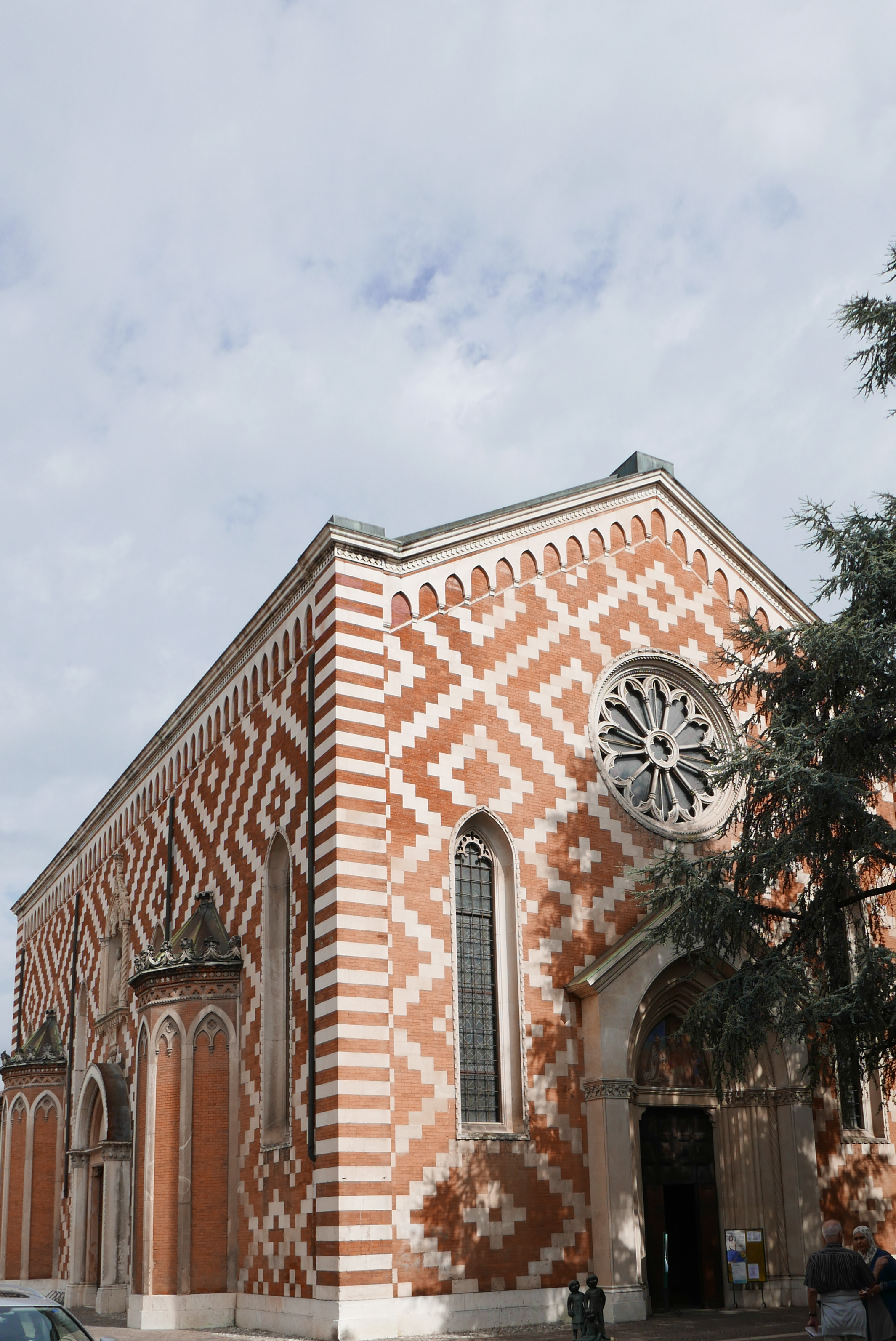 Facciata